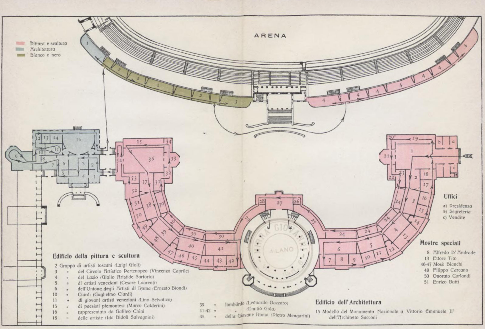 Mappa della Mostra nazionale di belle arti del 1906 a Milano. Architetto Sebastiano Giuseppe Locati